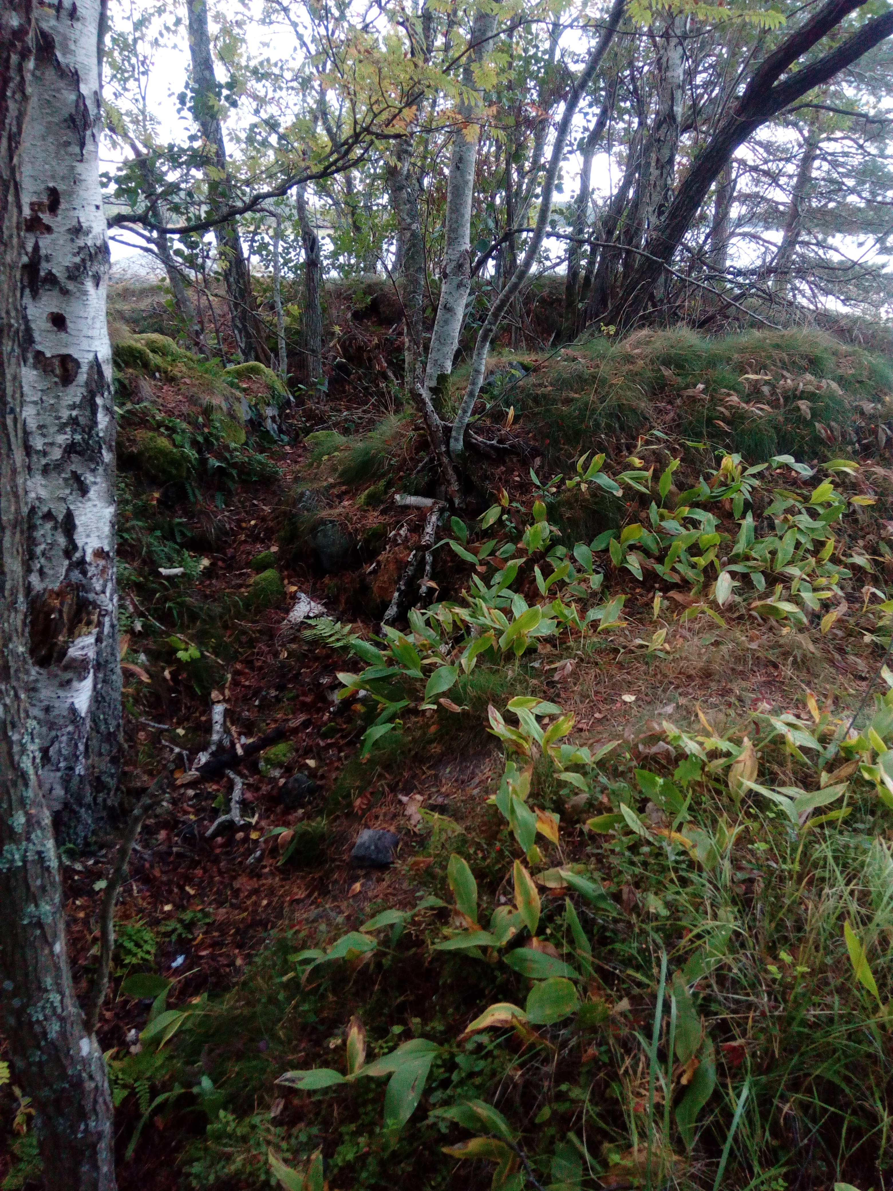 Konekivääriaseman jäännökset Hangossa, Santalan kartanosta noin 600m pohjoiseen